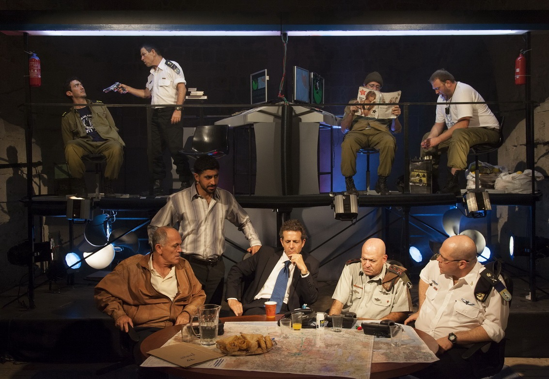 פפפפפפפ, פסטיבל עכו, תיאטרון האינקובטור